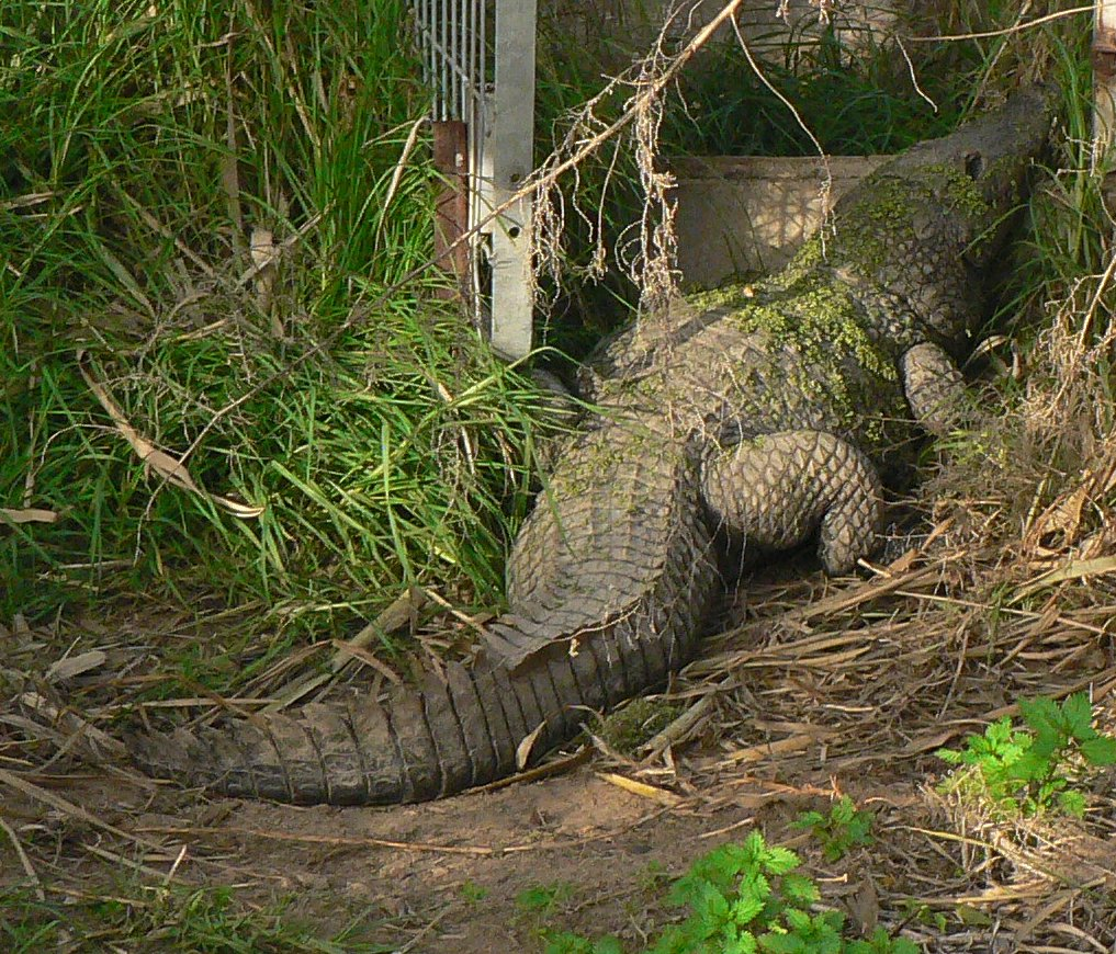 צולם בגן הזואולוגי בת"א Taken in Tel Aviv Zoological Gardens תנין Crocodile